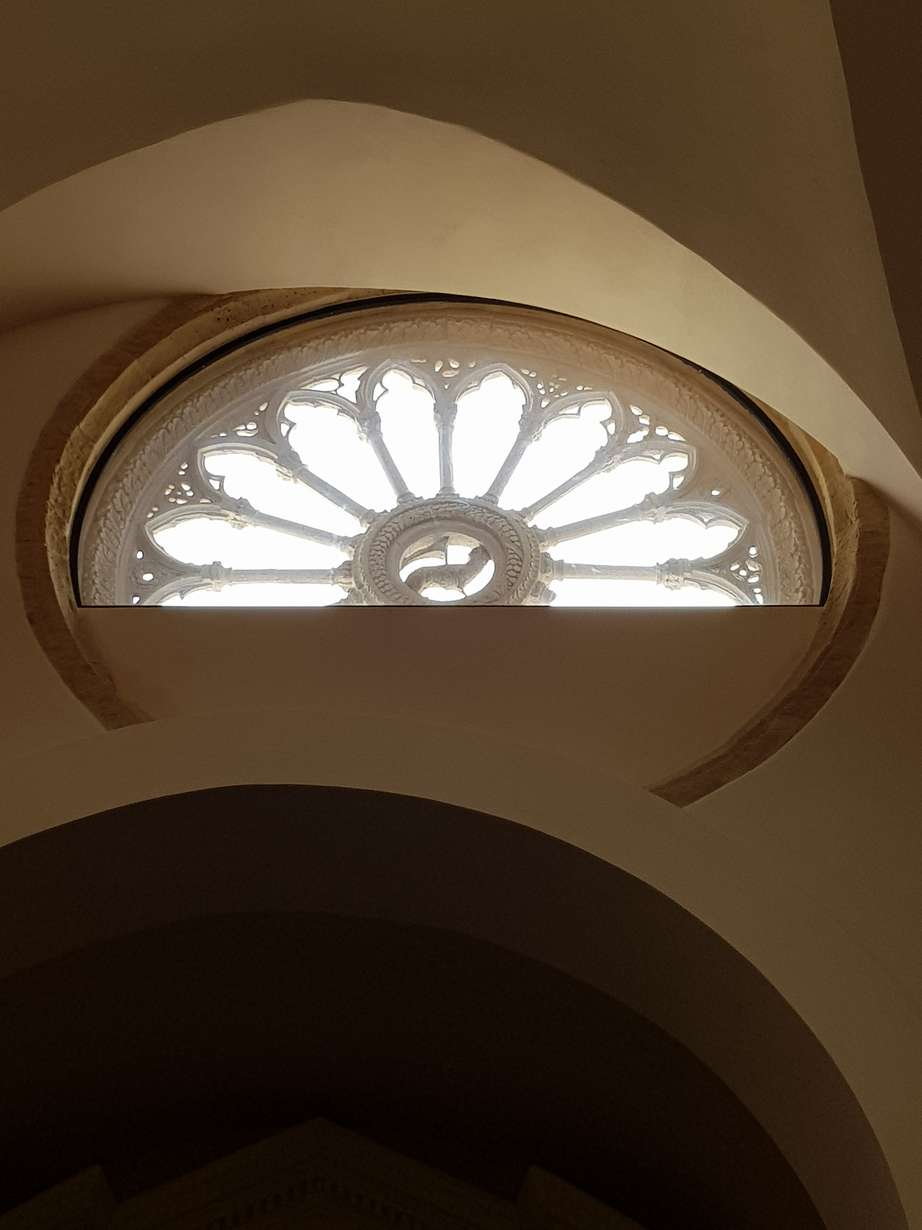 Antico rosone dopo il restauro Chiesa Madre Mottola